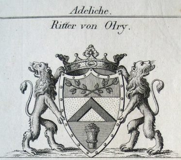 Wappen des französisch-bayerischen Adelsgeschlechtes der Ritter von Olry